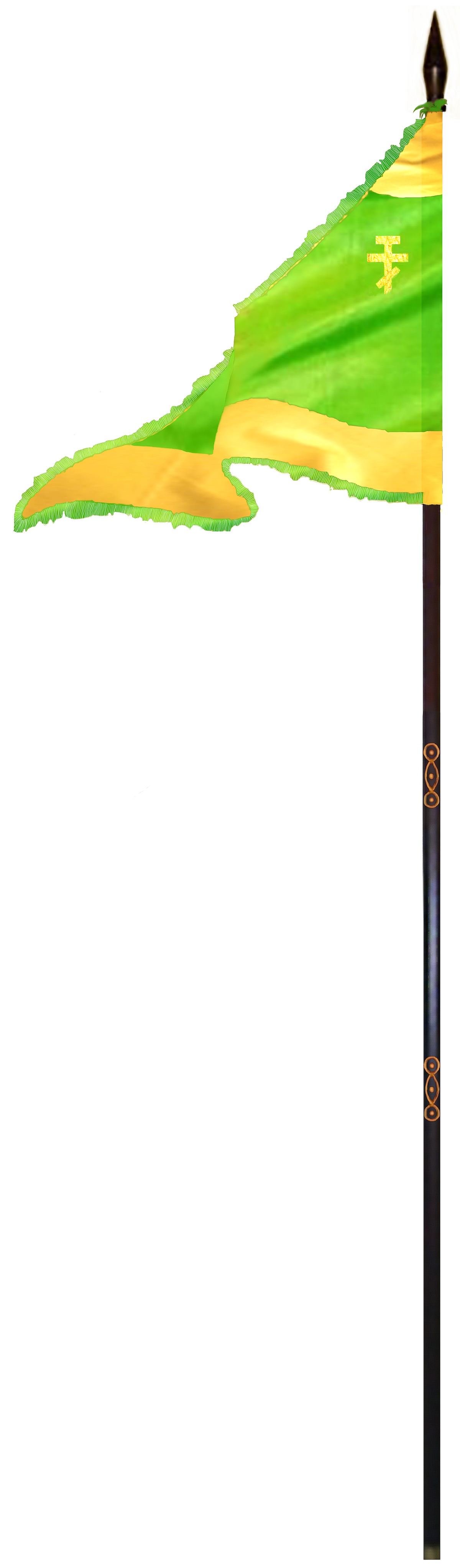 Опис слике: Ратна застава (зелена) Стефана X Уроша Душана Немањића (1308-1355), краља Србије (владао: 1331-1345), а потом и цара (владао: 1345-1355), који нам је такође познат и као Стефан Урош IV Душан „Силни” Немањић, а која се чува у српском манастиру „Хиландар” на Светој гори. Аутор слике (реконструисане заставе): Петар Б. Богуновић